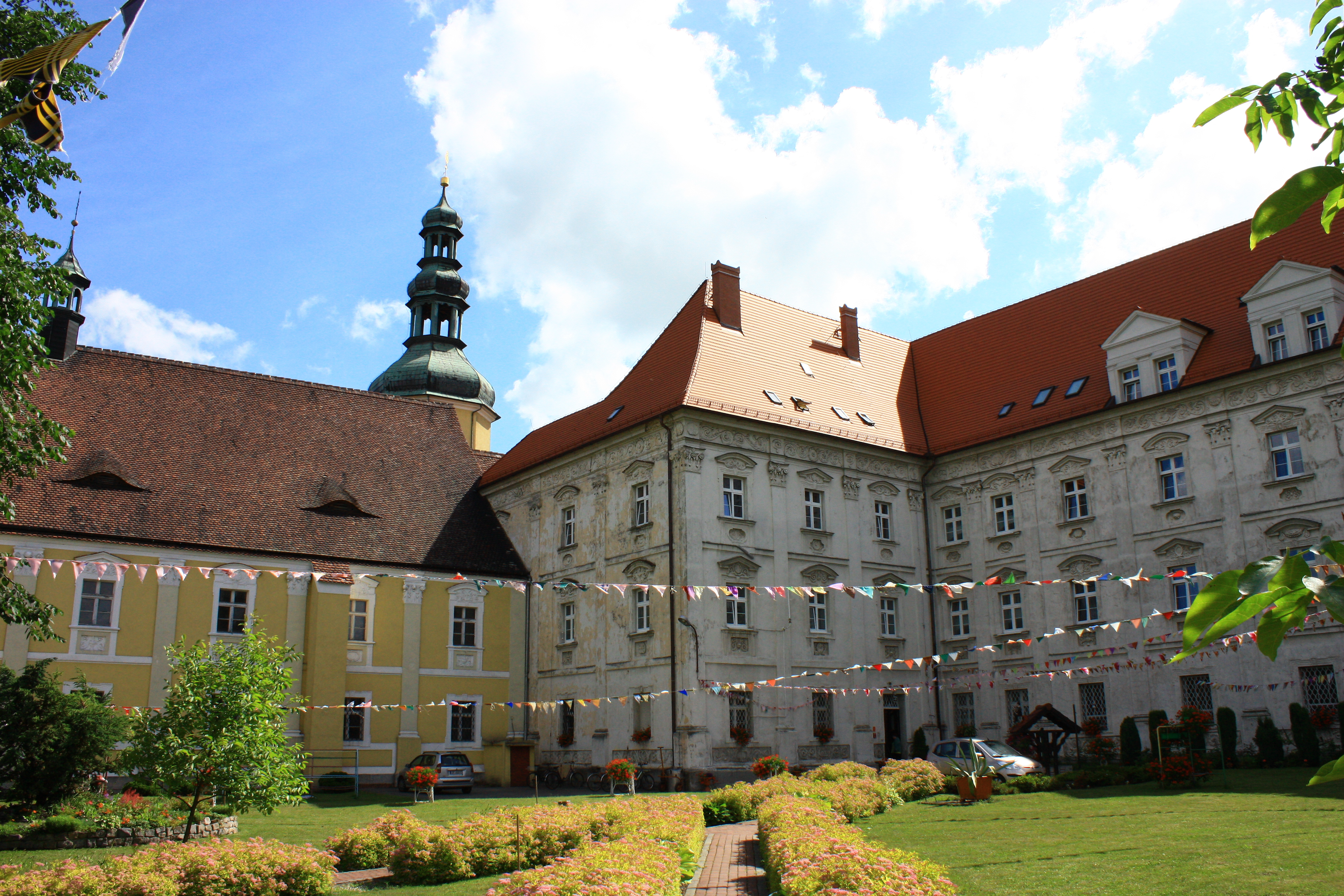 Czarnowąsy, klasztor, 1682